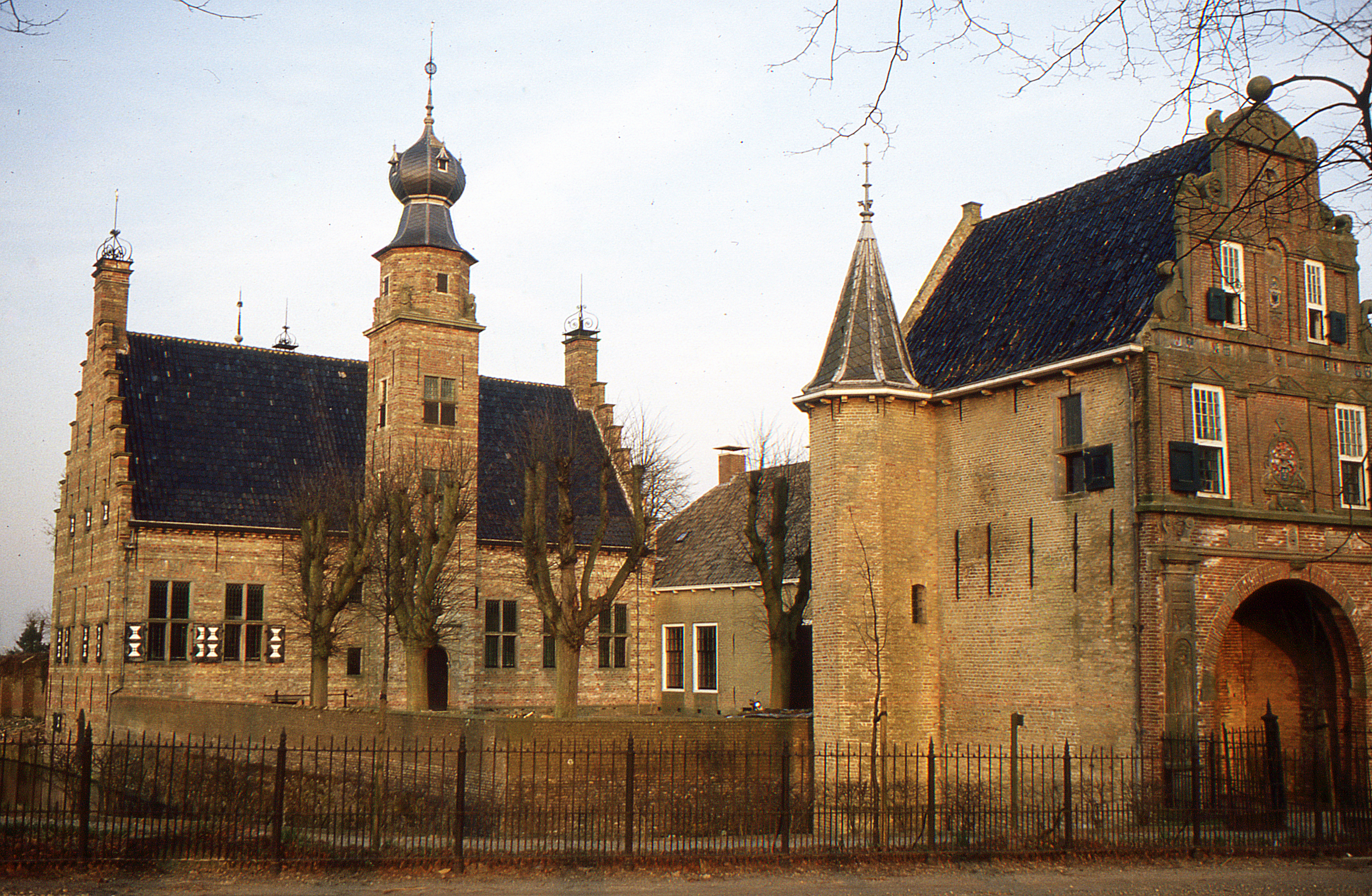 De westzijde van slot en poort in 1982.